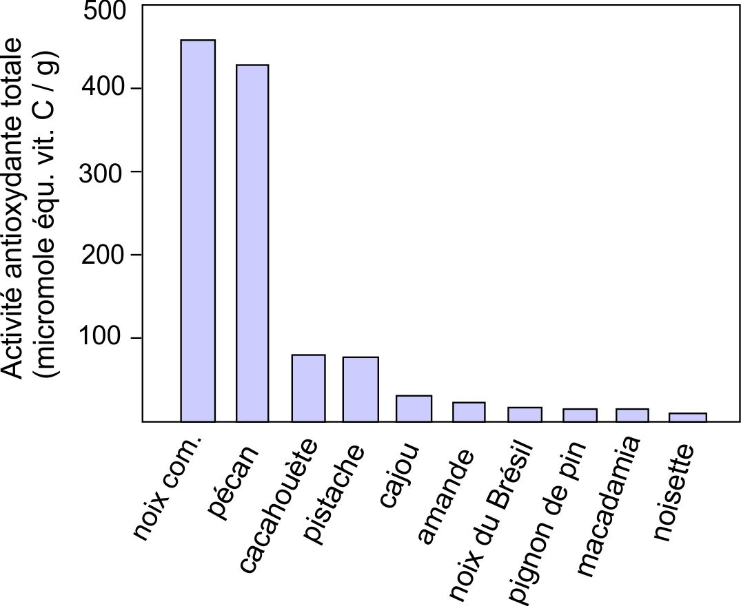 d'après Yang et al. "Antioxidant and antiproliferative activities of common edible nuts seeds" Food Science and Technology, 42, 2009